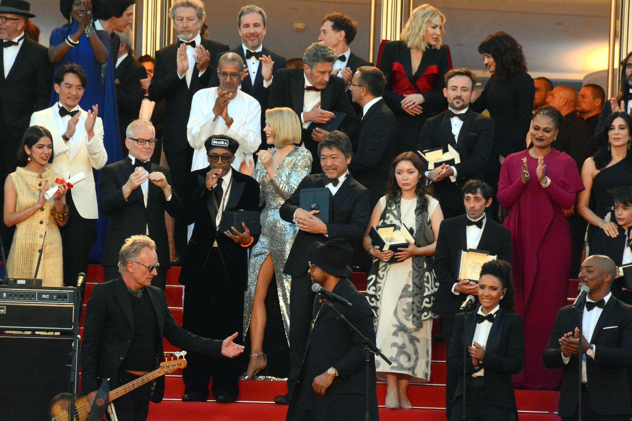 Cérémonie de clôture du festival de Cannes